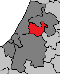 Localização da Provincia, dentro da Região de Rabat-Salé-Kénitra